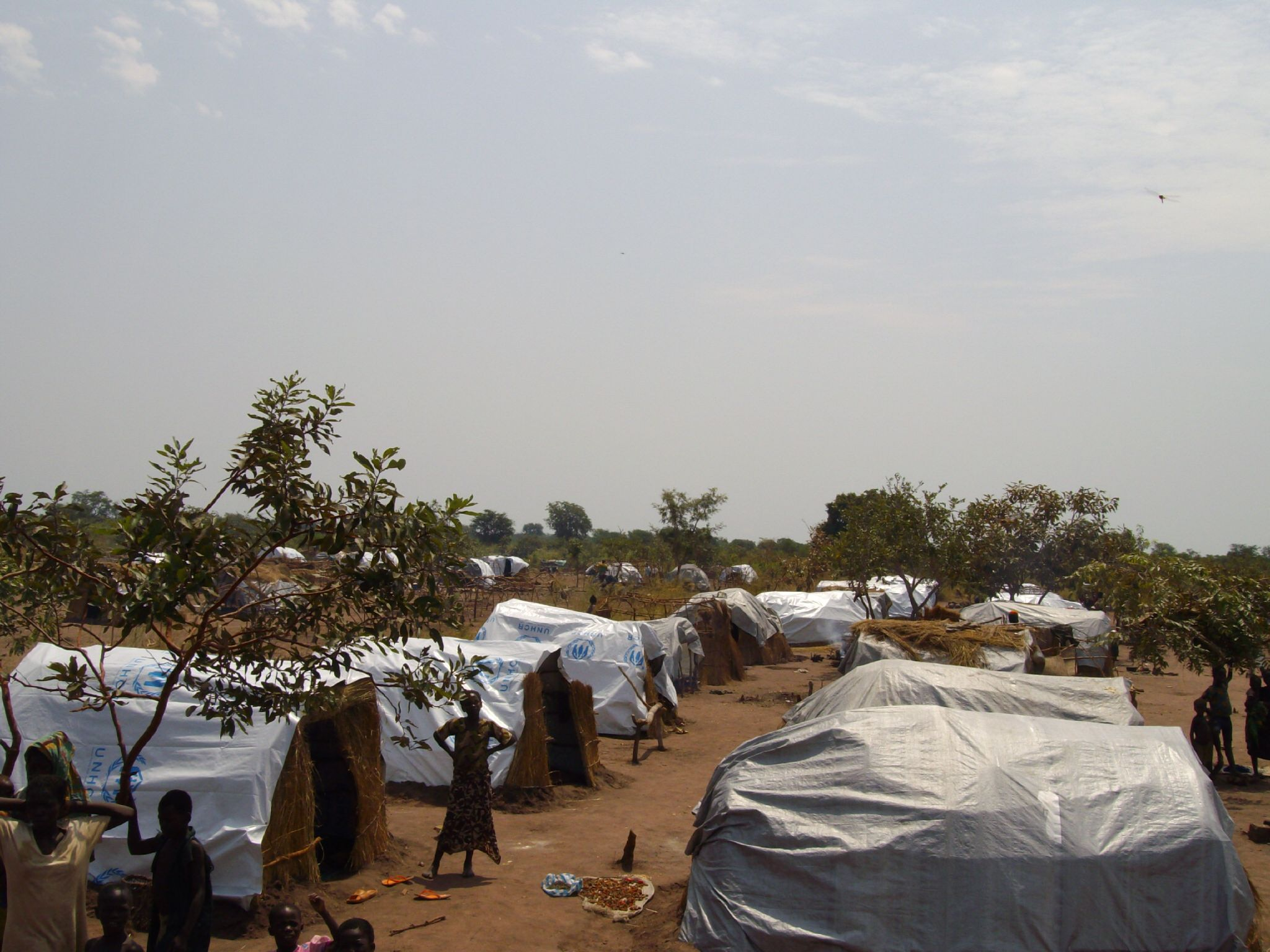 Lager für Binnenflüchtlinge (Internally displaced persons, IDP) im Norden der Zentralafrikanischen Republik in Kabo. In Kabo lebten (Januar 2008) 4.300 Flüchtlinge, die aus den dünn besiedelten Gebieten der nördlichen und nordöstlichen Zentralafrikanischen Republik vor Rebellen und Plünderern geflohen sind.